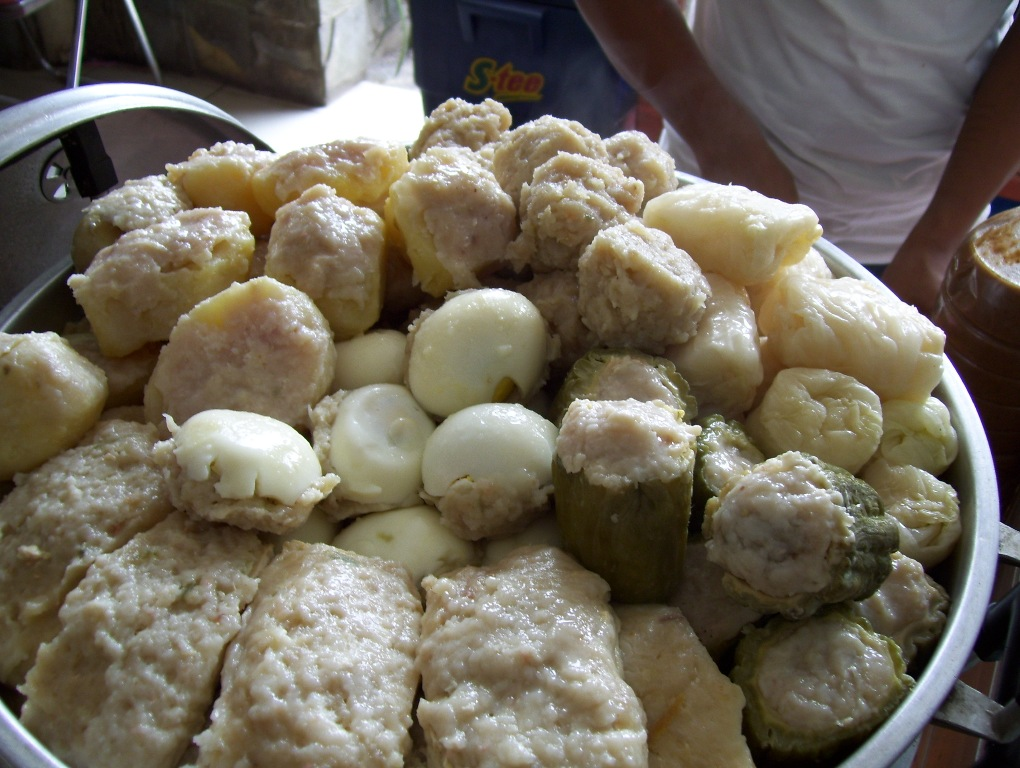 panci siomay